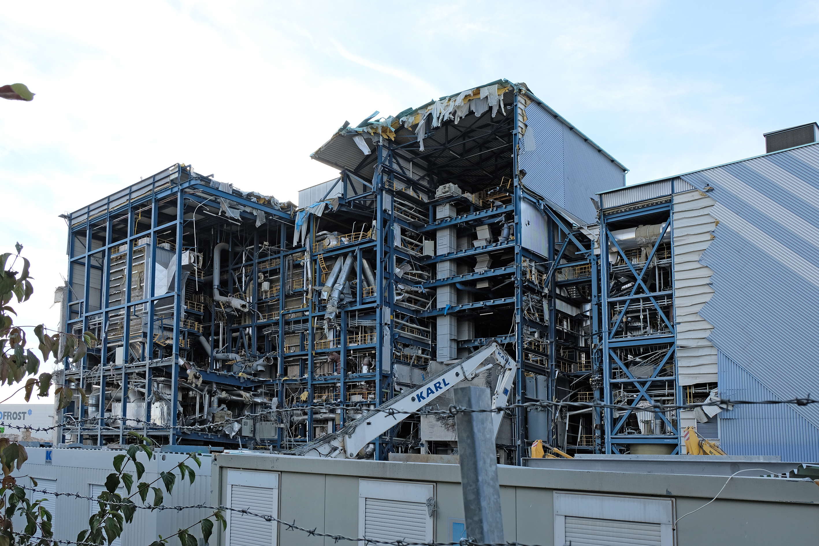 Abbrucharbeiten an der Müll-Schwelbrennanlage in Fürth, Sept. 2018